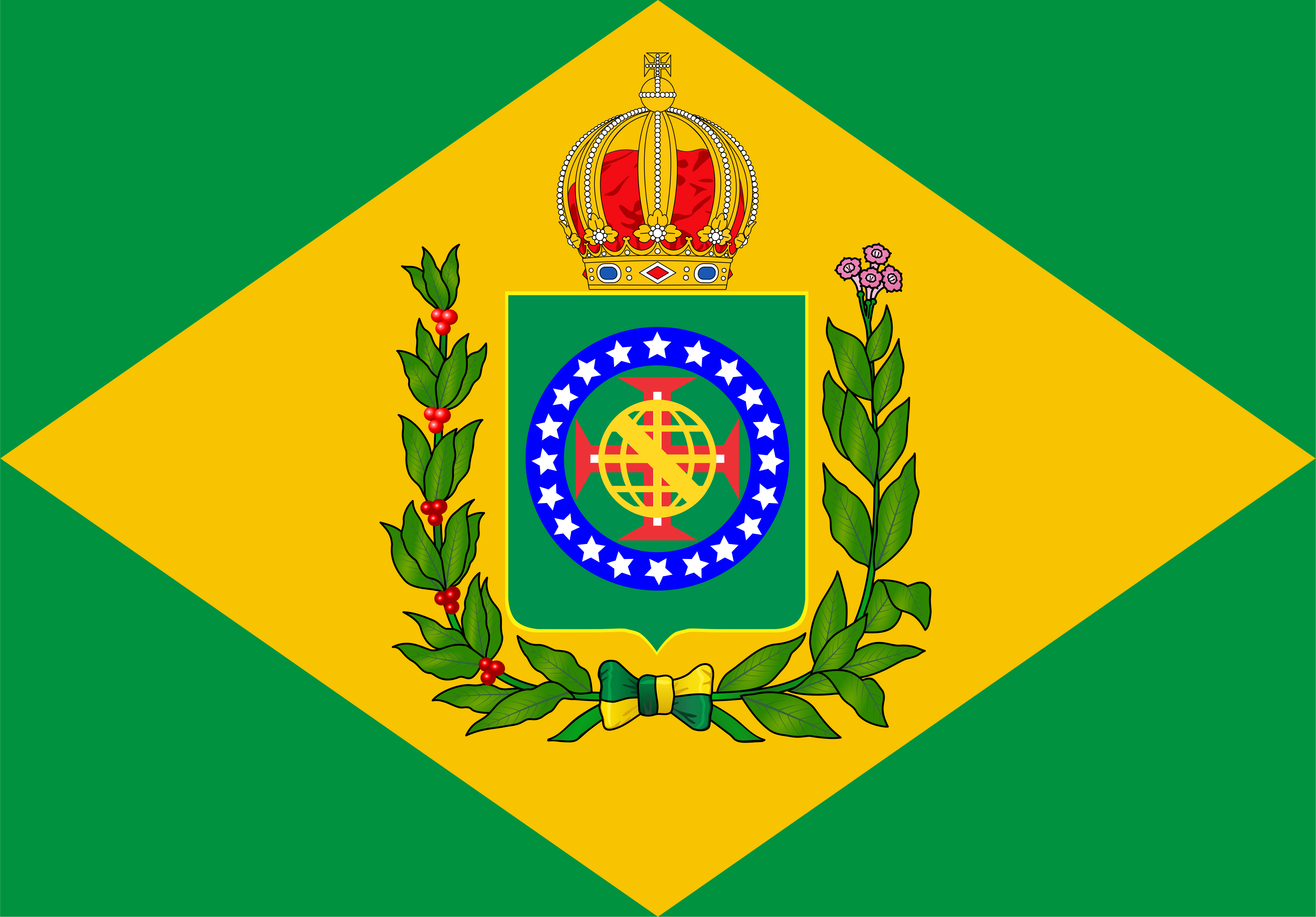 O brasão imperial sofreu inúmeras alterações, houve moedas cunhadas com o escudo do tipo francês e polonês além do mais comum escudo do formato inglês. A cor do laço e o desenho do laço sofreram muitas variações em bandeiras oficiais, a bandeira que mais se assemelha com a descrição oficial é essa, com laço verde e amarelo e forro da coroa em vermelho, porém o modelo oficial ainda não foi definido pela família imperial. Ou falta pesquisas mais aprofundadas no Arquivo Nacional do Brasil. Porém, esse livro, feito por heraldistas a pedido do governo brasileiro tem melhores informações sobre o símbolo com feitura heráldica mais correta. Também sugere-se estudos na literatura heraldista brasileira, entre outros autores, sugere-se: ALMEIDA. Eduardo Peres Campelo de. Bandeiras históricas do Brasil. Secretaria do Ministério da Guerra. Rio de janeiro. 1961 PRADO, Eduardo. A Bandeira Nacional. 1 ed. Escola tipográfica Selesiana. Rio de Janeiro, 1903 GOIES, Eurico de. Os símbolos nacionais, estudo sobre a Bandeira e as Armas Nacionais do Brasil. São Paulo: escolas profissionais selesianas. 1908 PEREIRA, Armando de Arruda. Culto à Bandeira – considerações em torno de um equívoco. São Paulo, 1950. BAILLY, Gustavo Adolfo. Bandeira e hinos. Rio de Janeiro. A. Coelho Branco editor, 1942 Atualmente a heráldica brasileira convencionou que o escudo era o modelo francês, por razões várias, como devido o autor, J B Debret ser francês. (LUPONI, Arthur. Símbolos Nacionais Brasileiros - Decreto-Lei n° 4545, de 31 de julho de 1942. São Paulo: MEC, Departamento Nacional de Educação. s.d.)